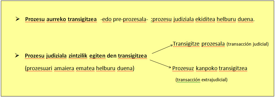 Transakzio-kontratoak azaltzeko eskema